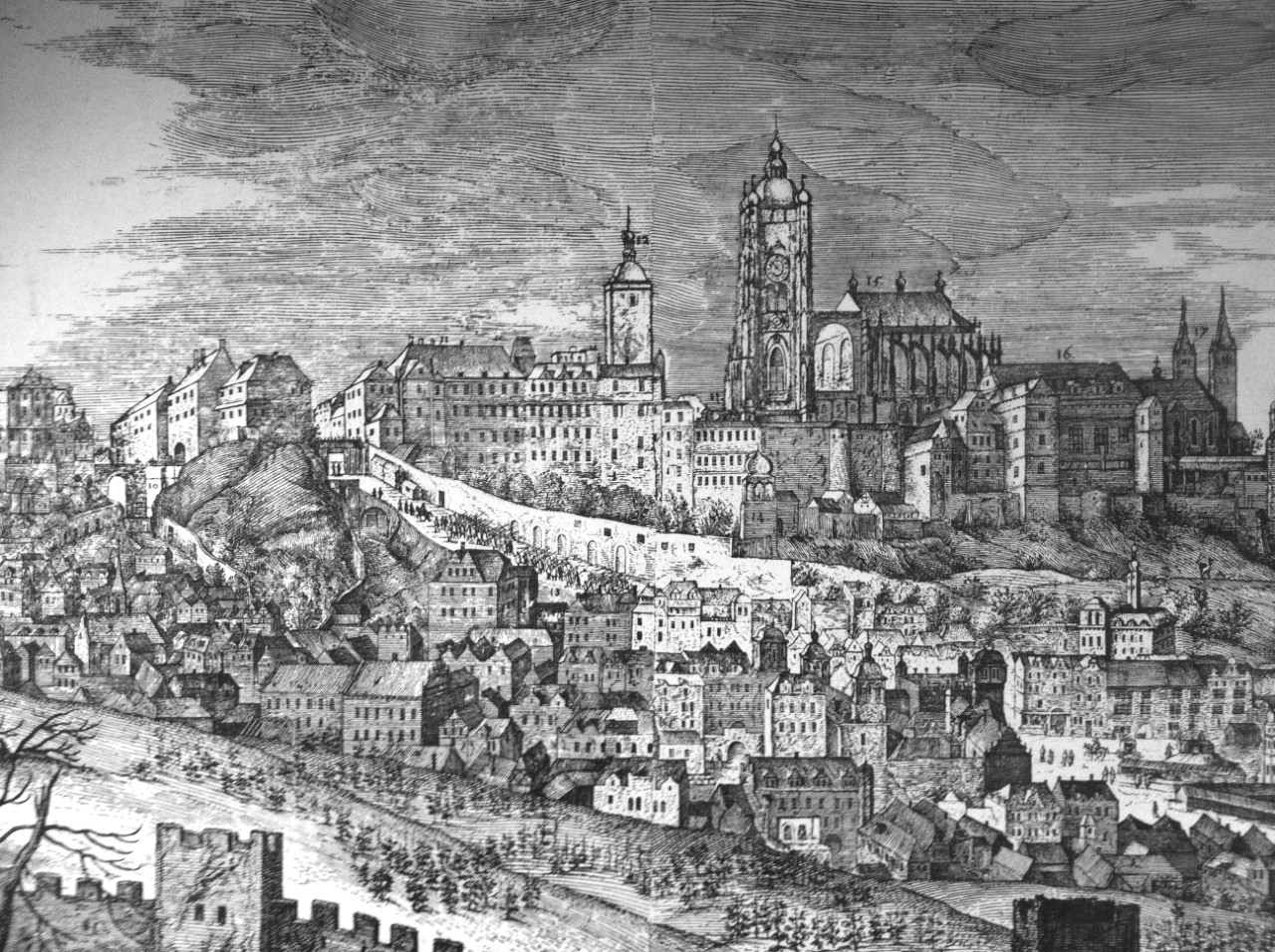 Západní část Pražského hradu r. 1606.